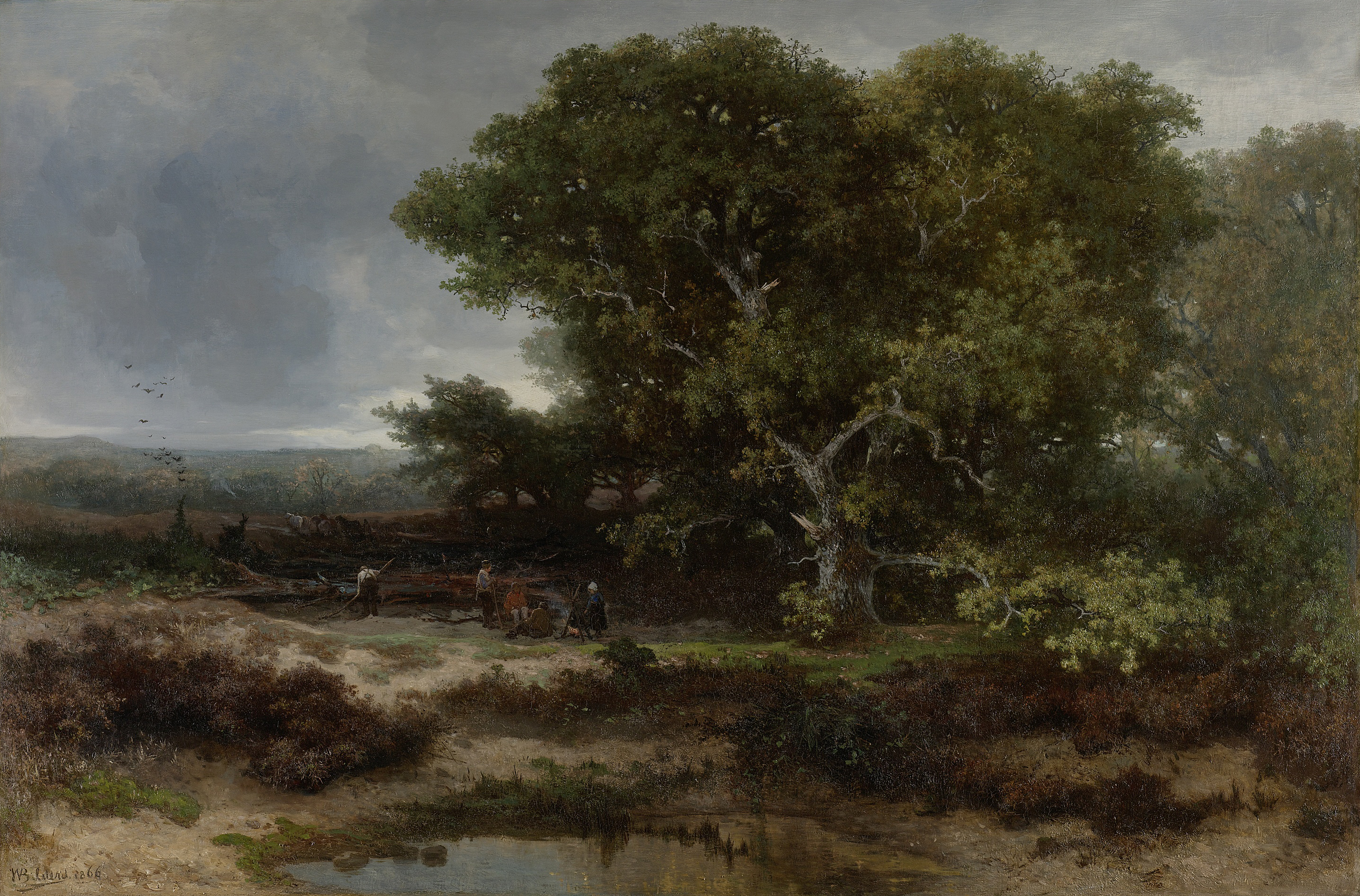 Landschap met een gezicht over de heide bij Wolfheze. Rechts een groep zware eiken. Links een groep figuren rond een open vuur.